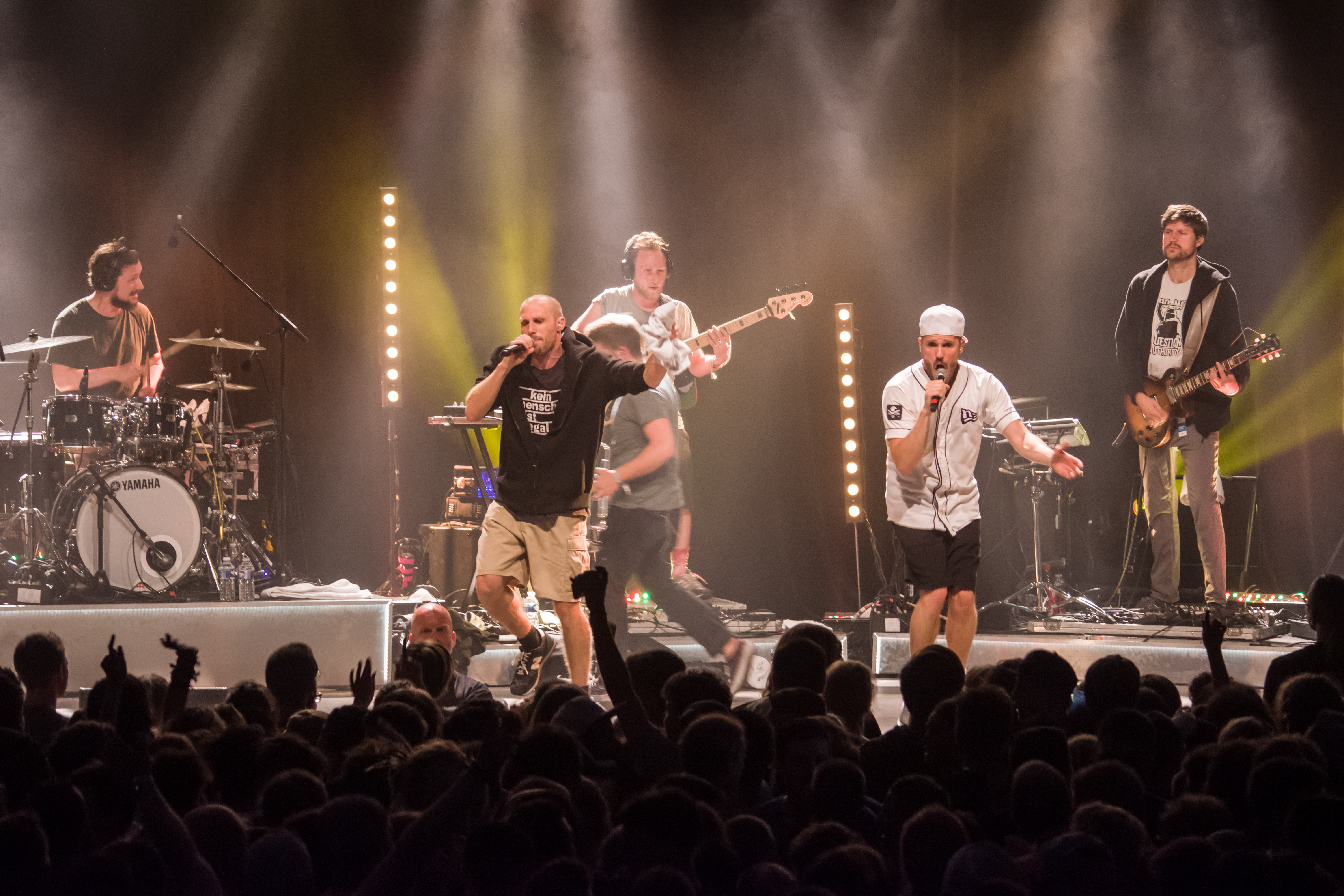 Das Zelt-Musik-Festival 2017 in Freiburg im Breisgau 15.07.2017 Irie Révolté